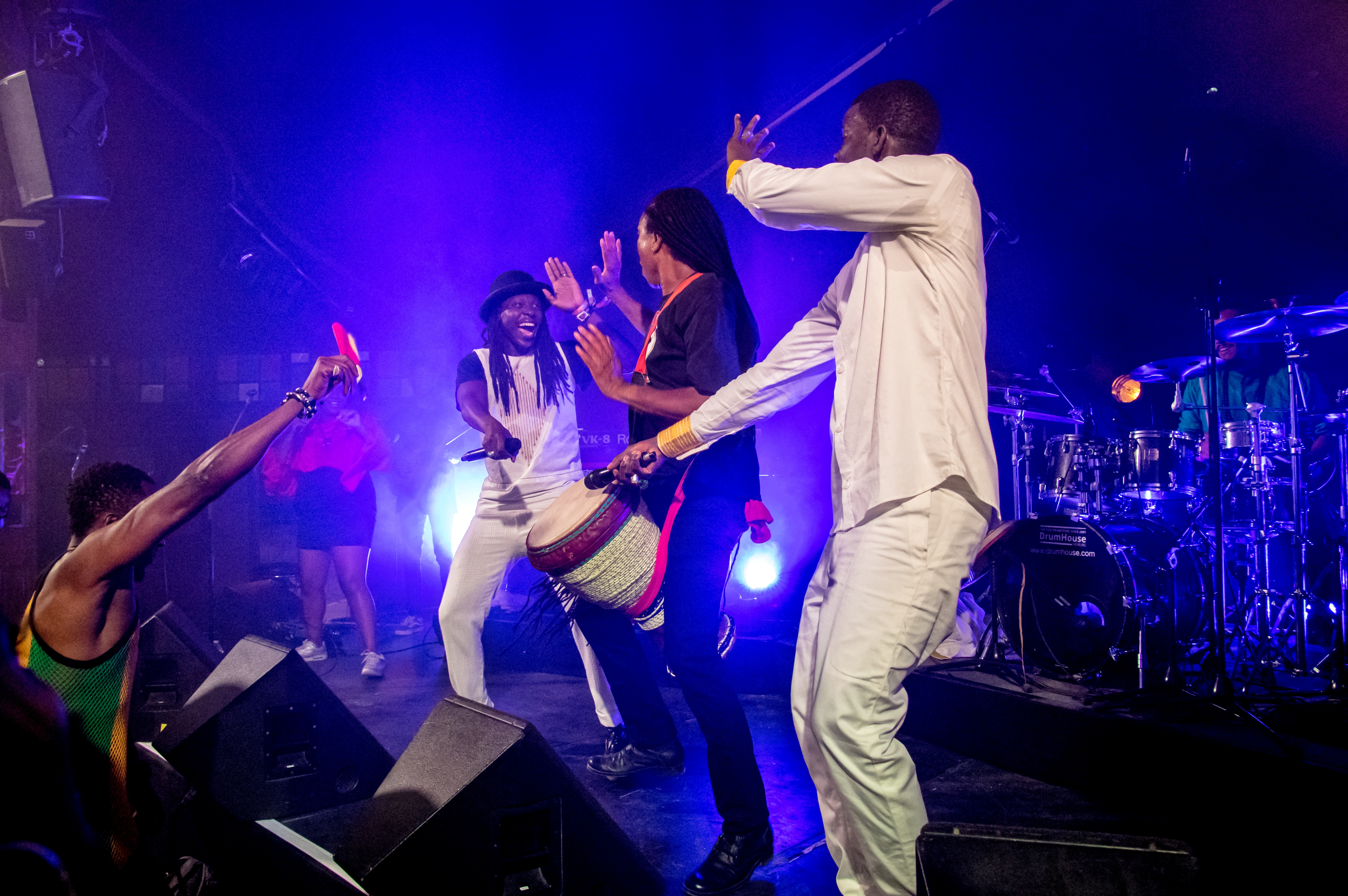 Bilder vom Zelt Musik Festival 2018 in Freiburg im Breisgau Daara J am 29.07.2018 im Spiegelzelt